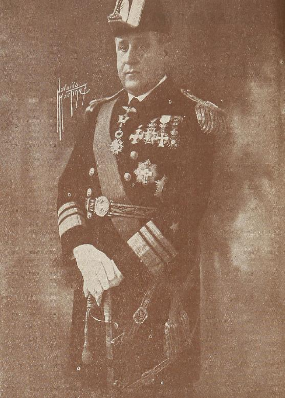 Julio Allard Pinto (11 de junio de 1885 - 29 de mayo de 1945) fue un político y militar chileno.